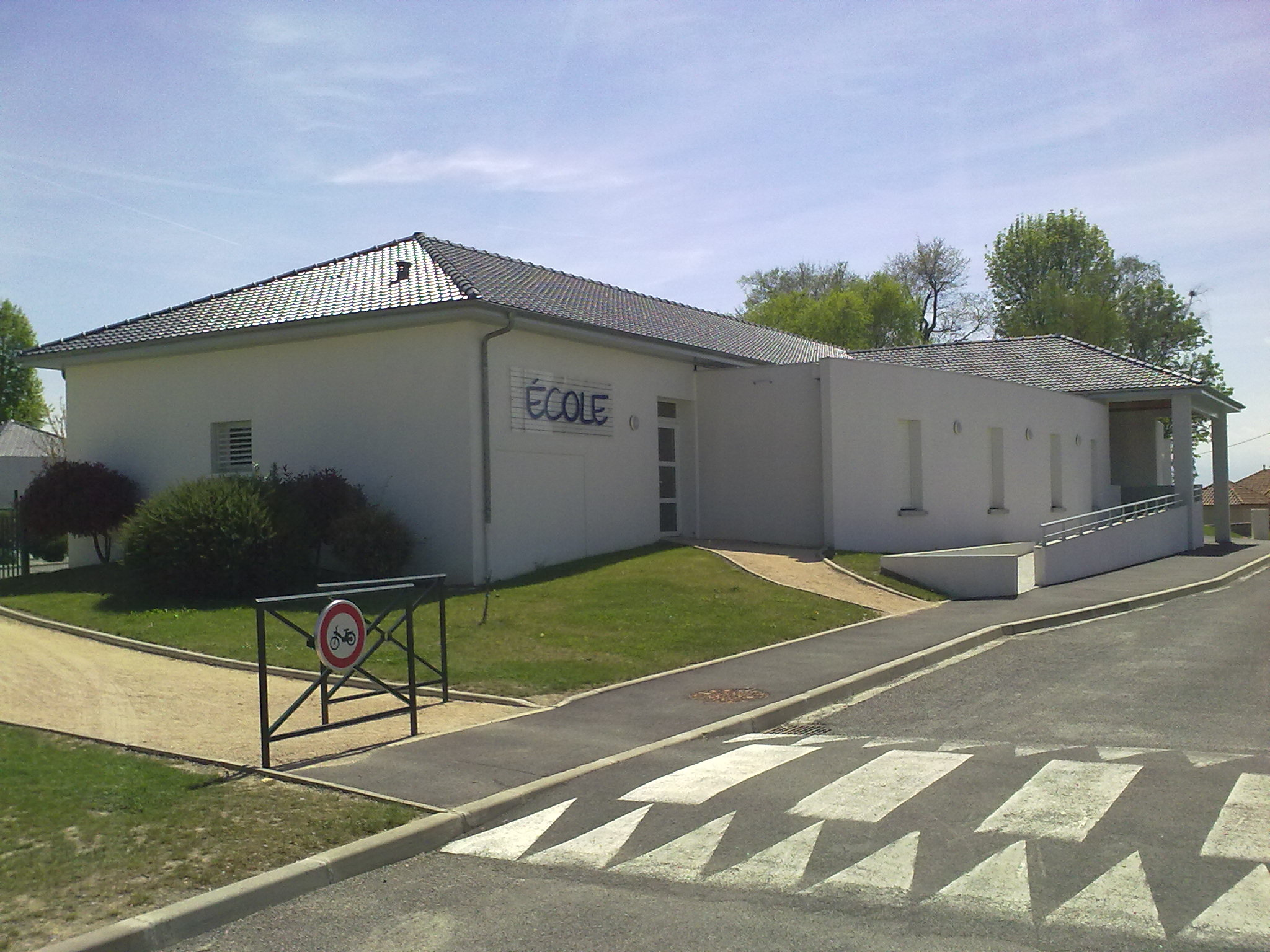 Andoins, France